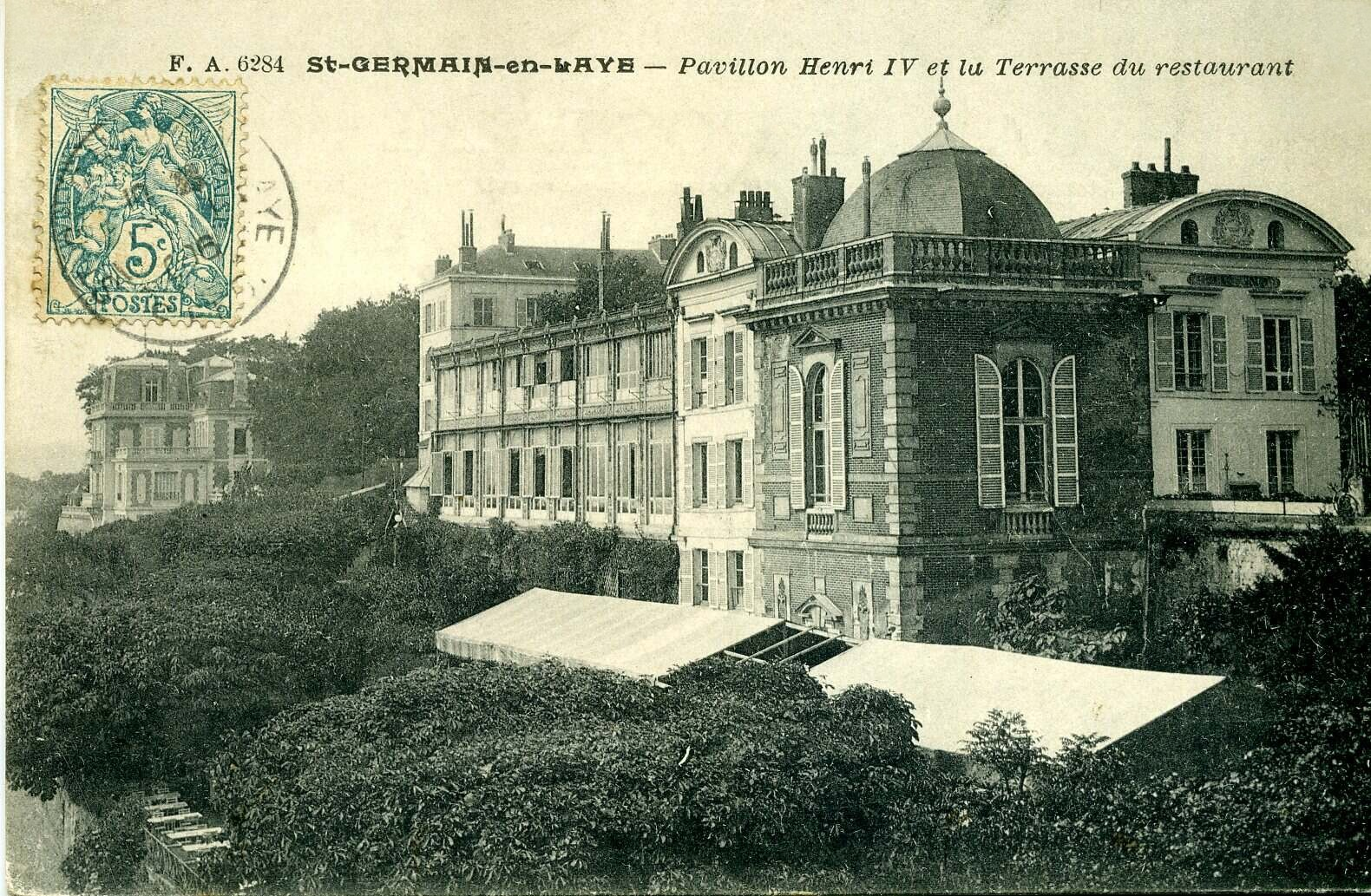 Le pavillon Henri IV à Saint-Germain-en-Laye vers 1900 (Yvelines - France)